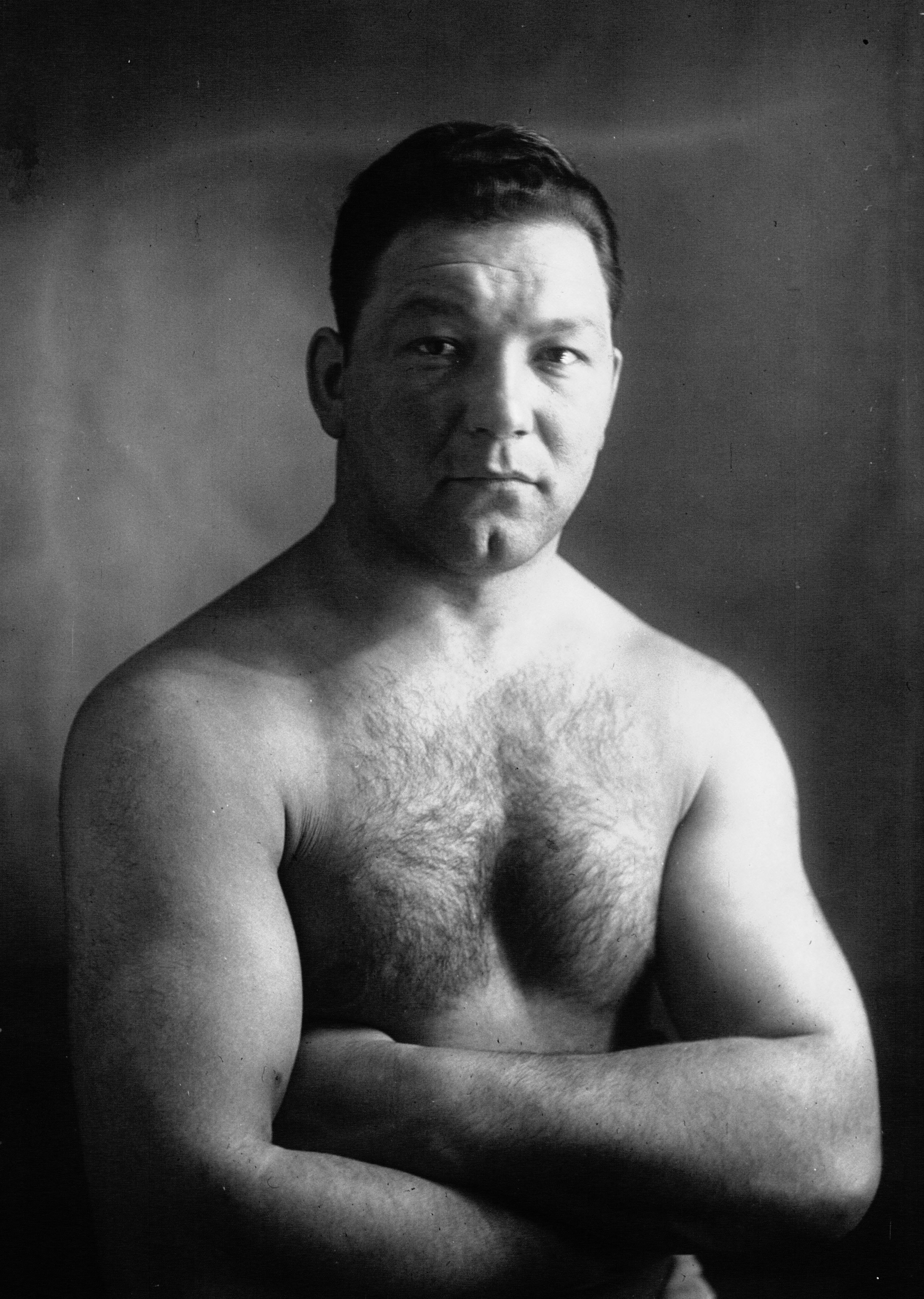 Robert Roth, lutteur suisse, champion olympique (gros plan).